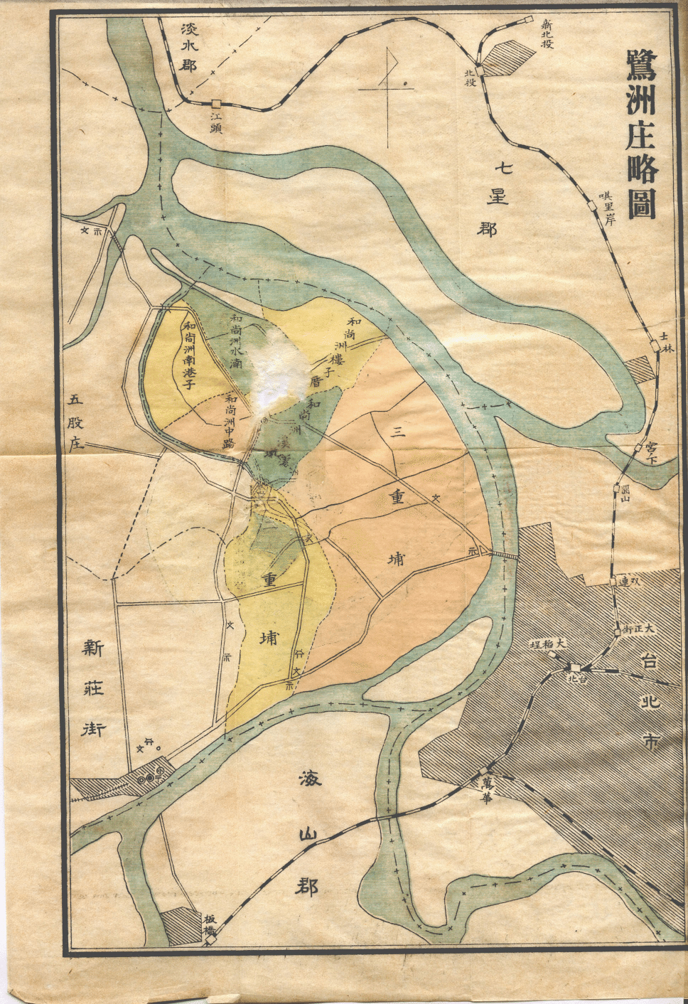 鷺洲庄略圖，1936年2月15日出版 Bân-lâm-gú: Lô͘-chiu-chng Lio̍k-tô͘, 1936 nî 2 goe̍h 15 hō chhut-pán